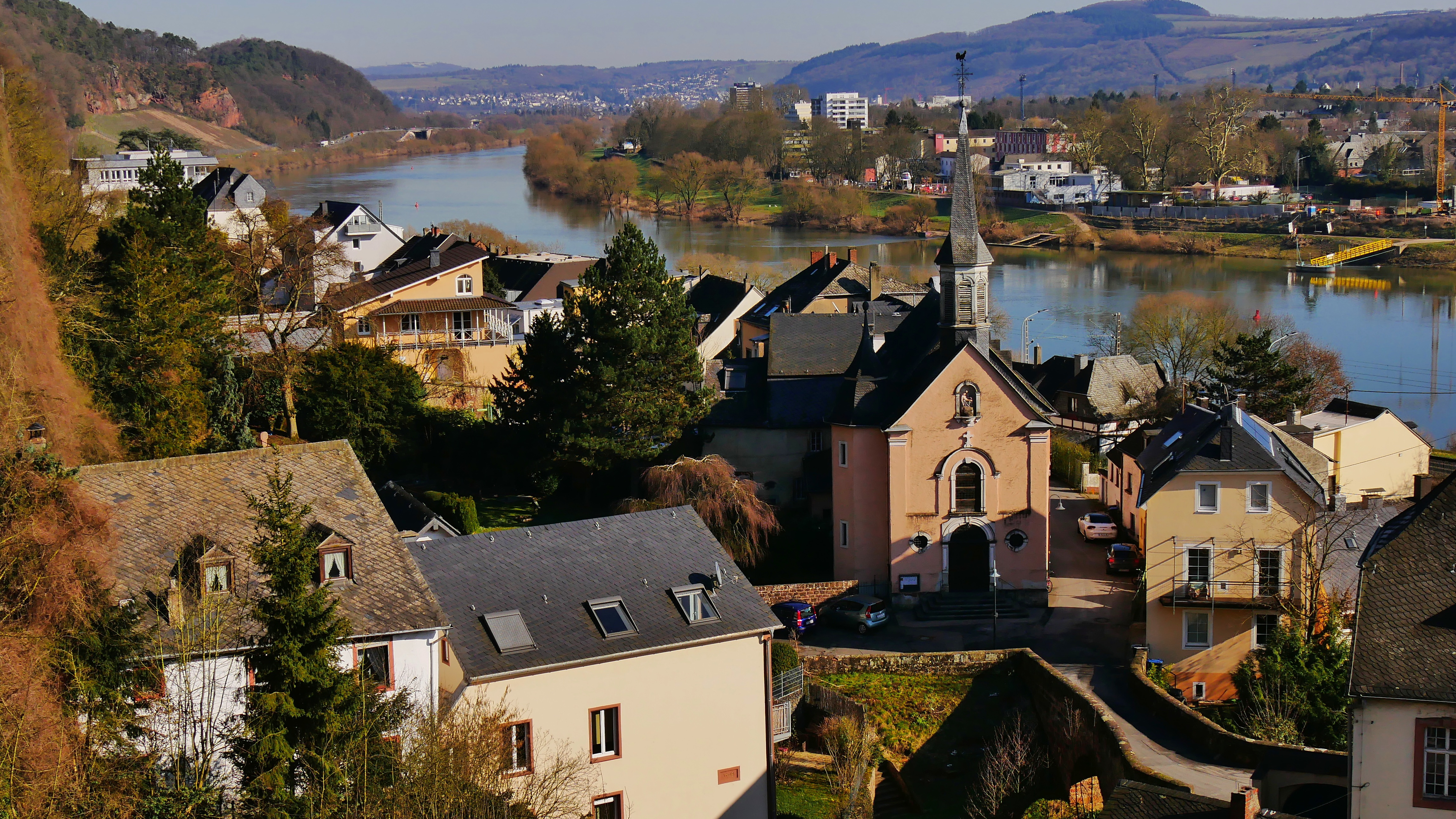 Trier-Pallien, St. Simon und Juda und Blick Moselabwärts